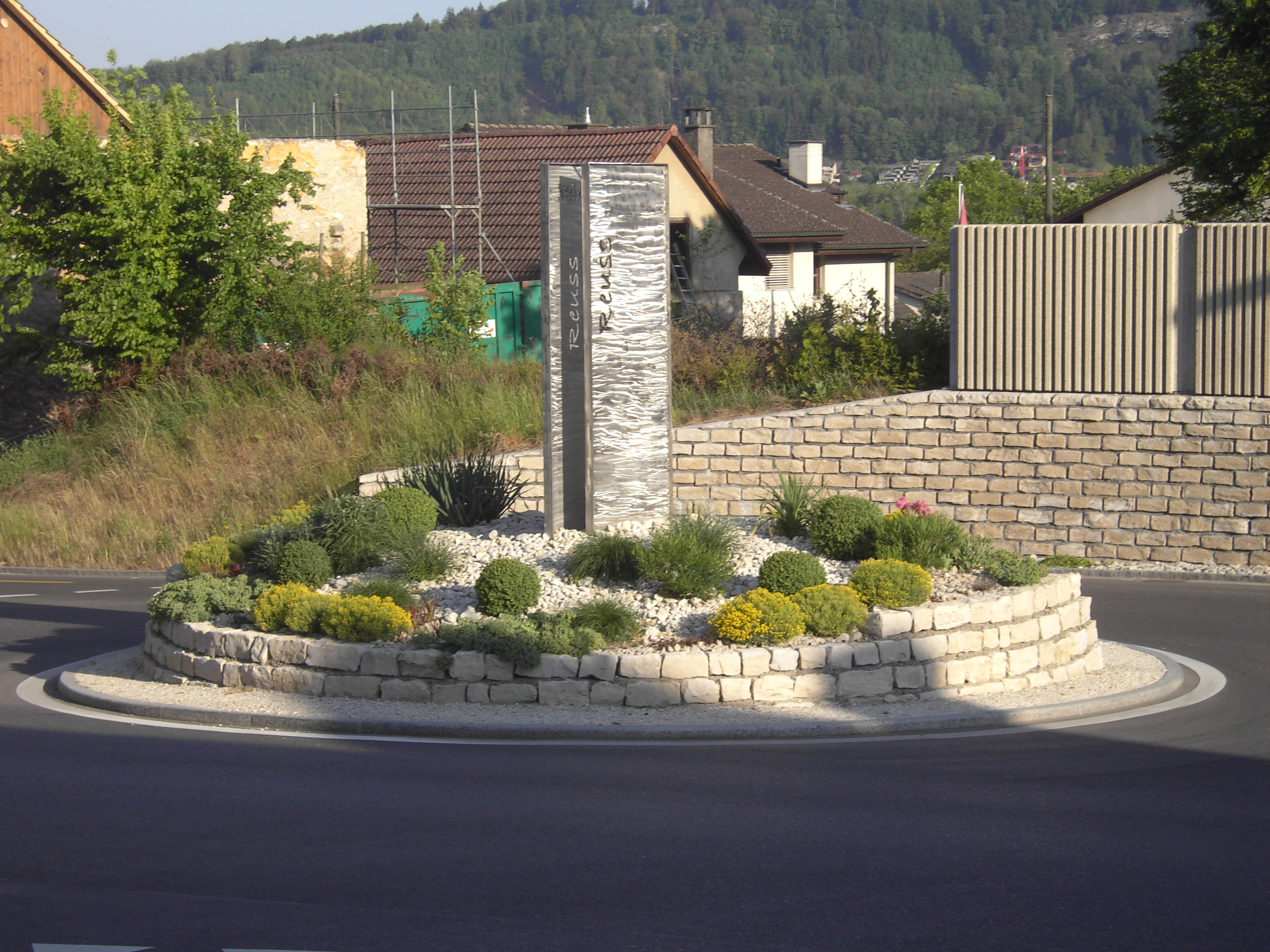 Verkehrskreisel, Gebenstorf AG, Schweiz